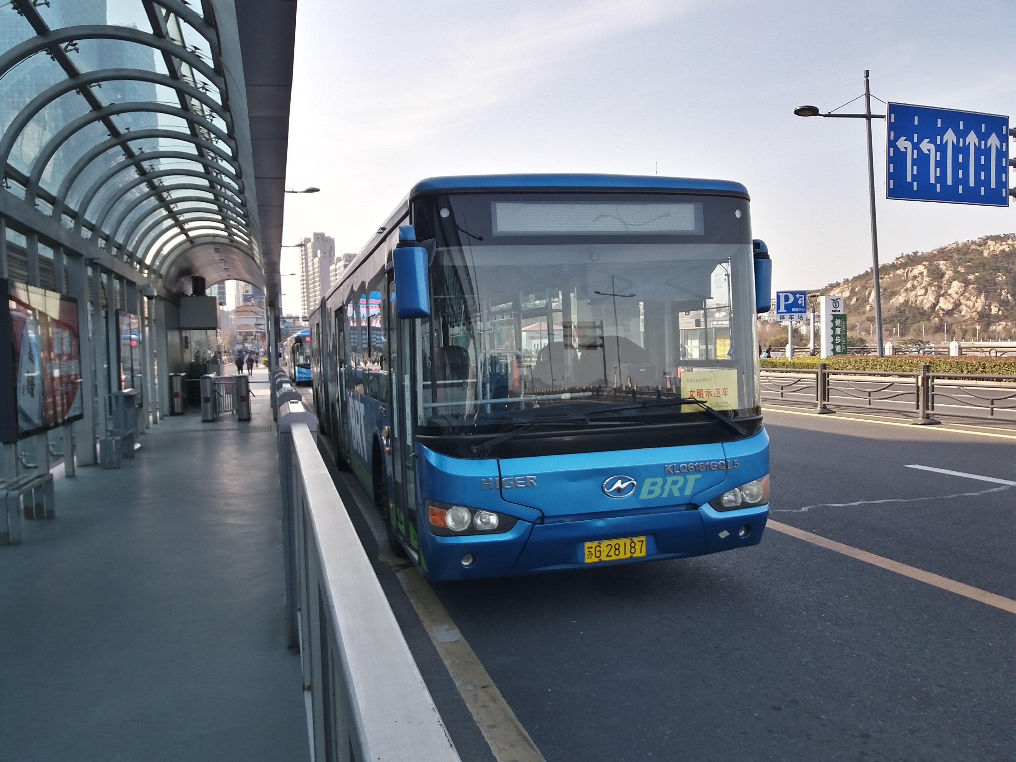 连云港在海一方BRT